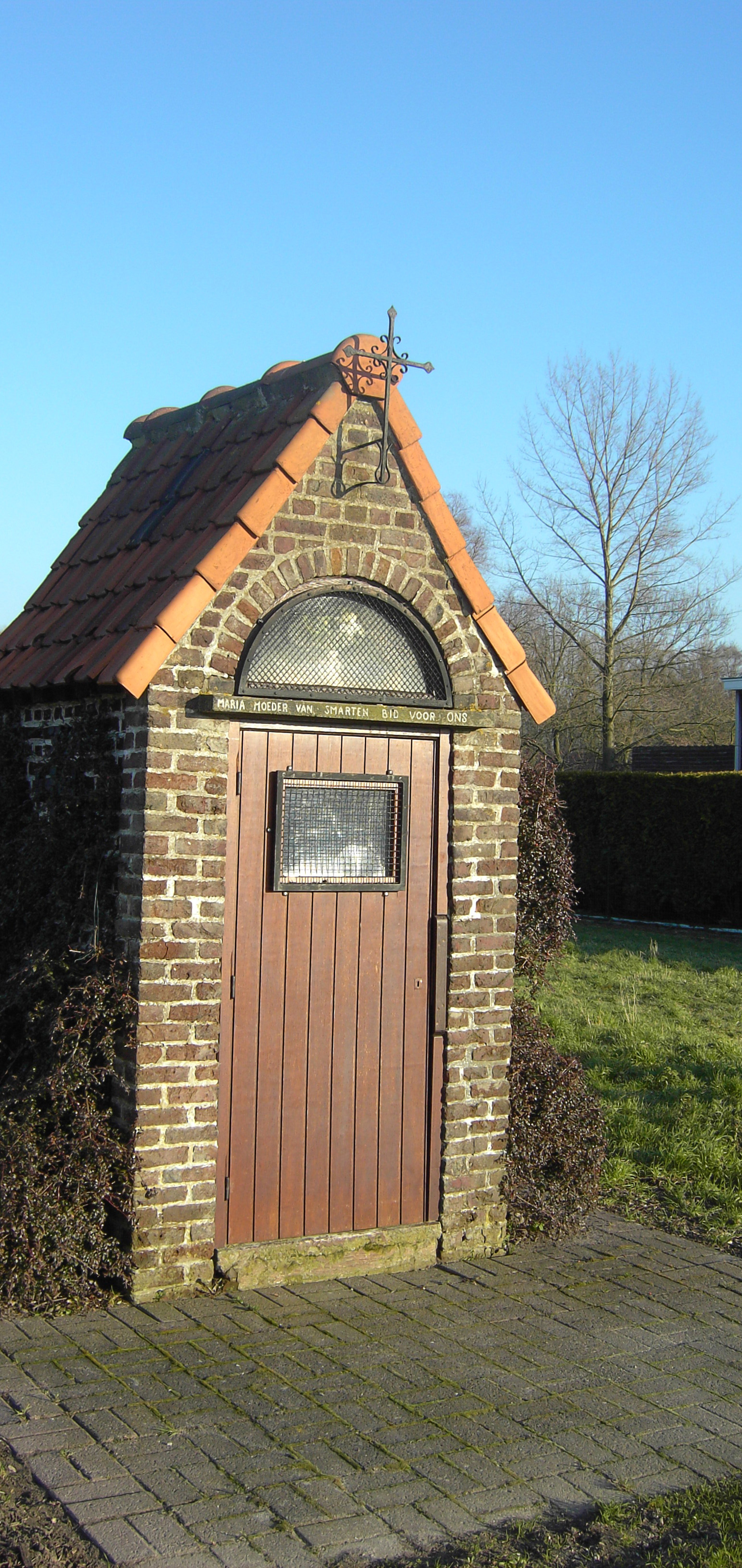 Merelbeke (Belgium) - Kapelletje op de Kerkhoek, op die plaats stond tot rond 1870 de oude kerk van Merelbeke. Het gebouwtje staat op die plaats waar het altaar stond.